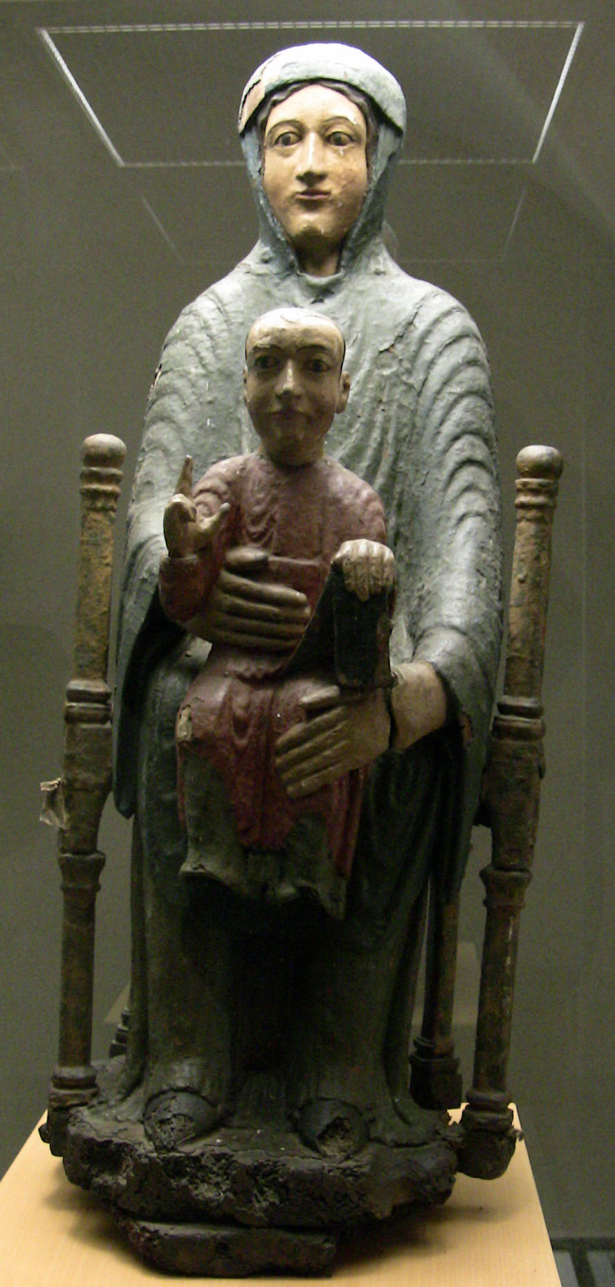 Notre-Dame d'Usson, groupe en bois sculpté et peint polychrome, XIIème siècle, Musée d'art Roger-Quilliot - Clermont-Ferrand (Puy-de-Dôme)